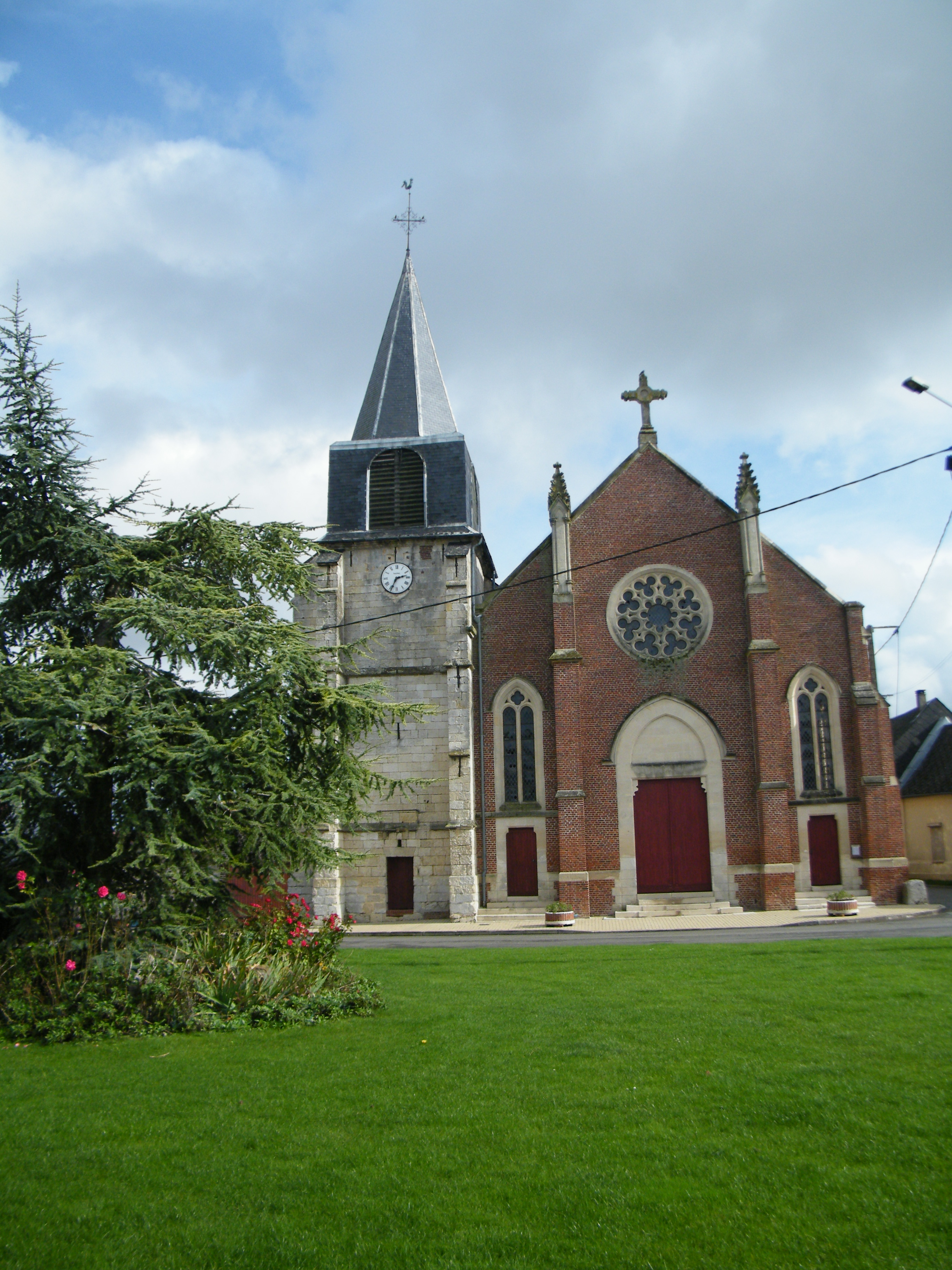 L'église Saint-Pierre de Belleuse, Somme, France.